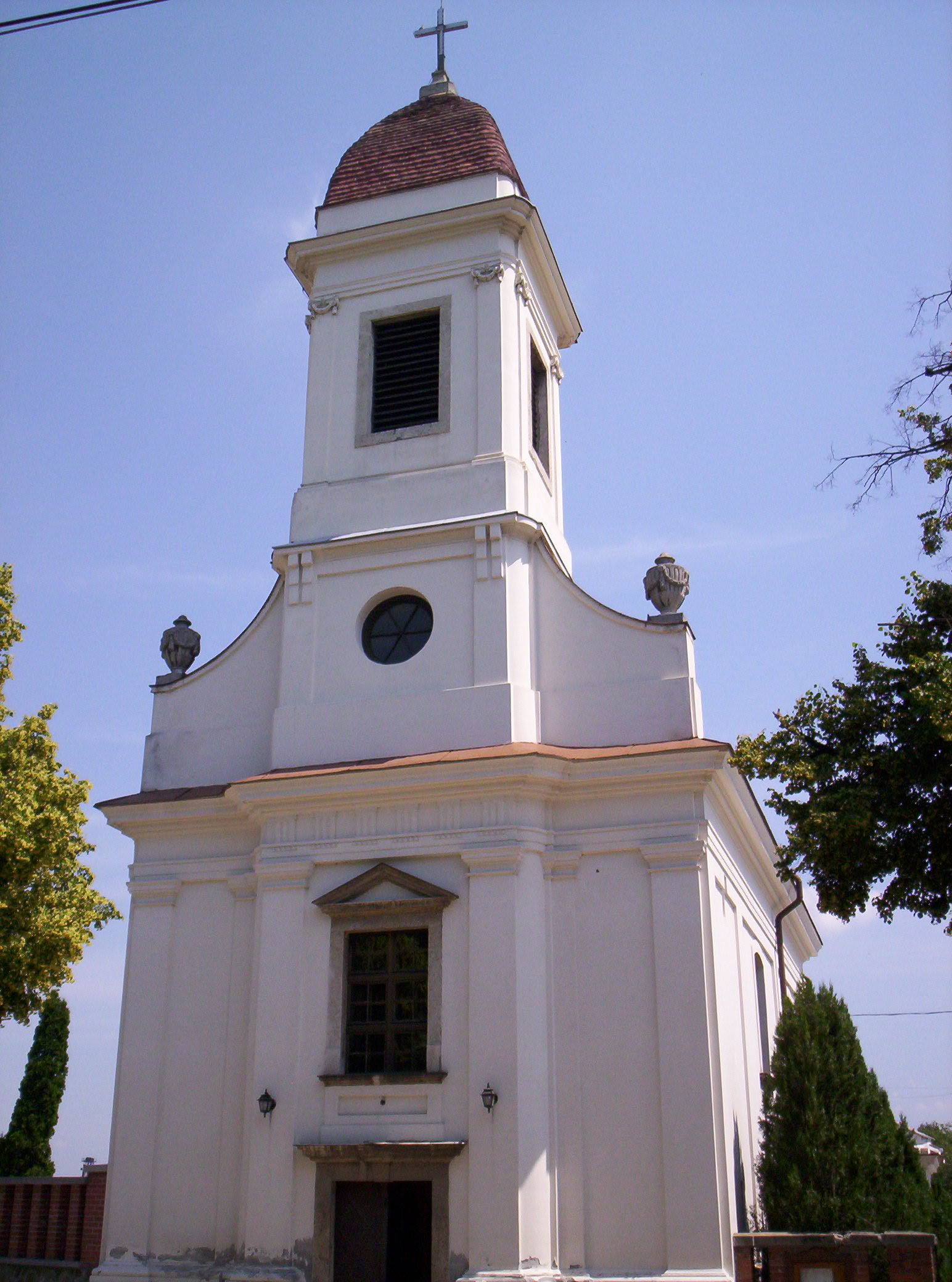 Calvary Church in Pápa, Hungary A pápai Fájdalmas Anya Kálvária-templom